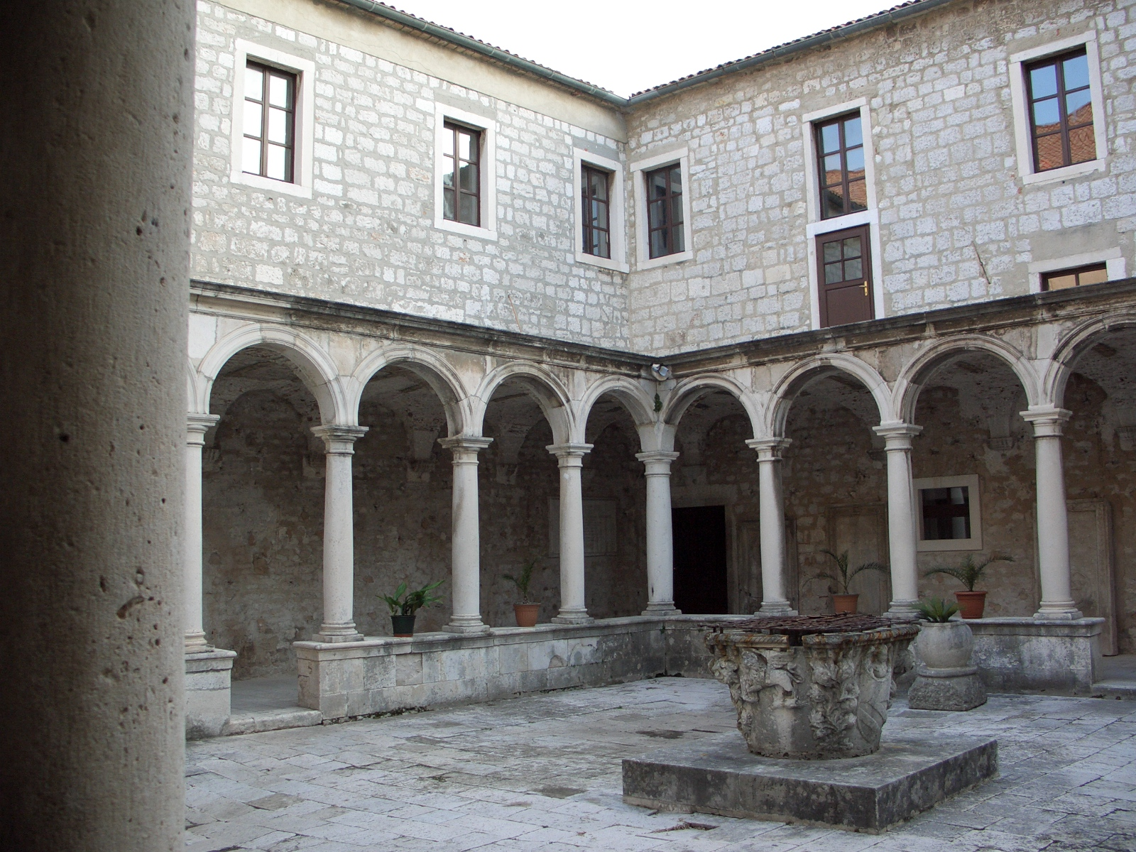 Zadar